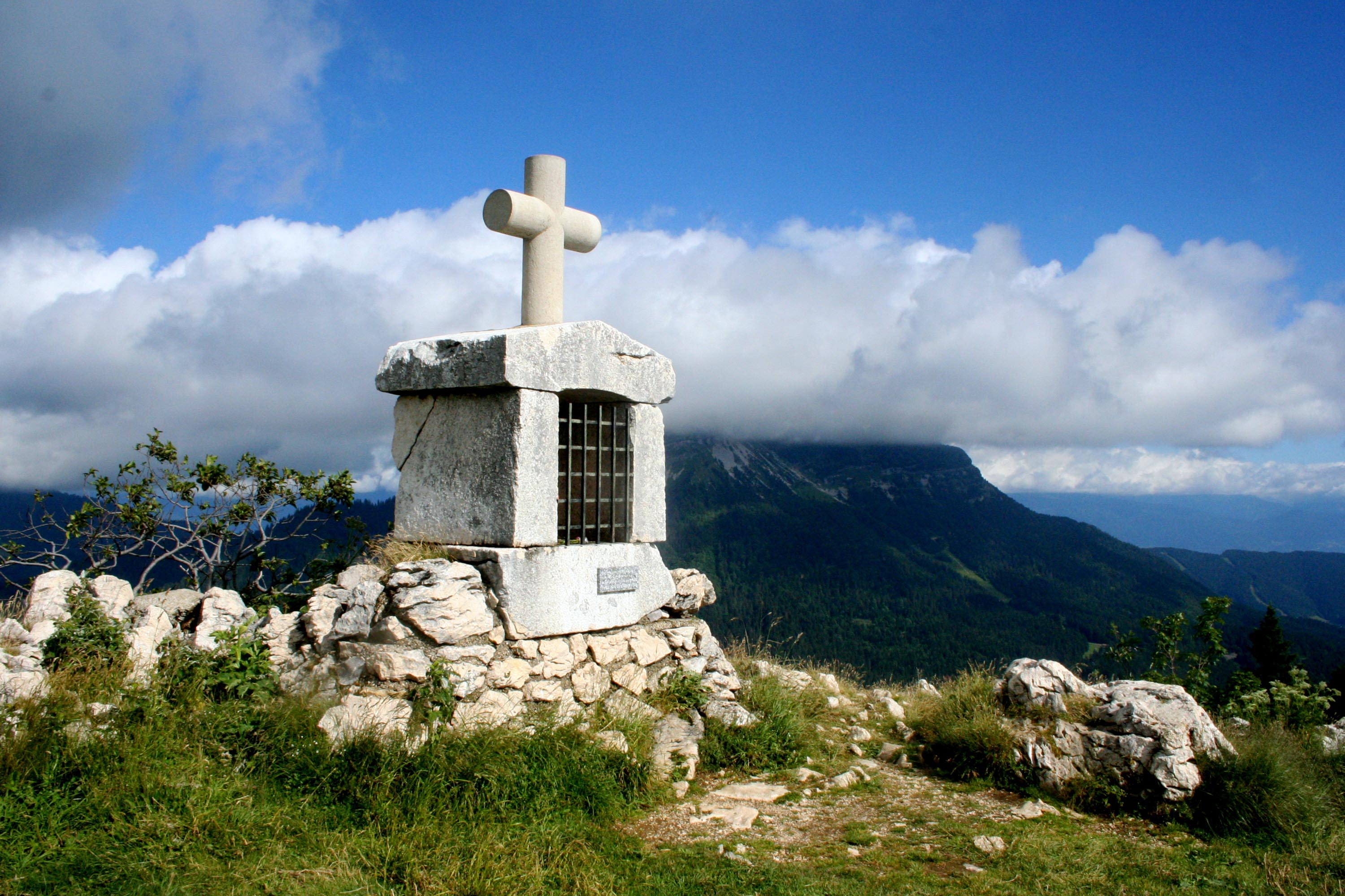 Oratoire d'Orgeval, en Chartreuse, au fond le Chamechaude